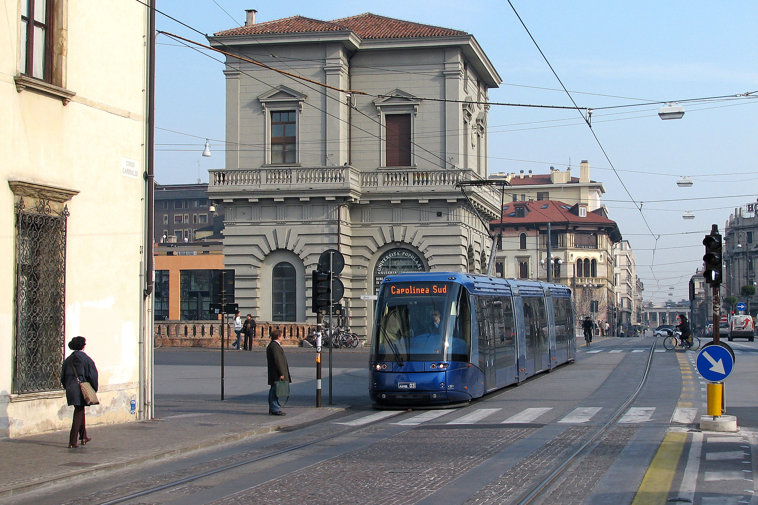 Vettura 03 in arrivo alla fermata Eremitani. *** Car 03 arriving at Eremitani stop.